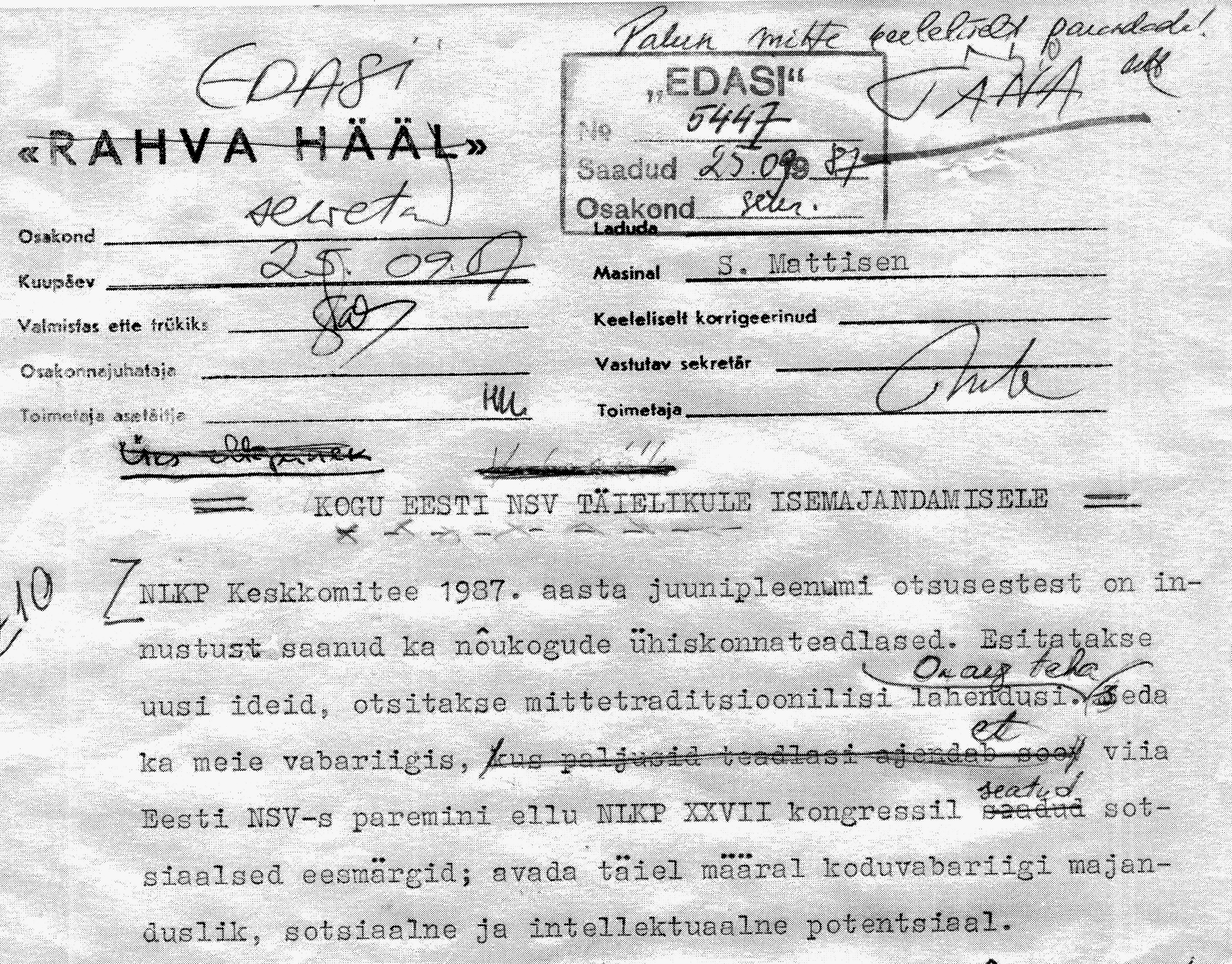 "Rahva Hääle" blanketile ümberlöödud trükivalmis tekst, mis läks avaldamiseks ajalehes Edasi nime all "Ettepanek: kogu Eesti NSV täielikule isemajandamisele".